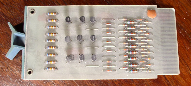 KA10 module (top view)